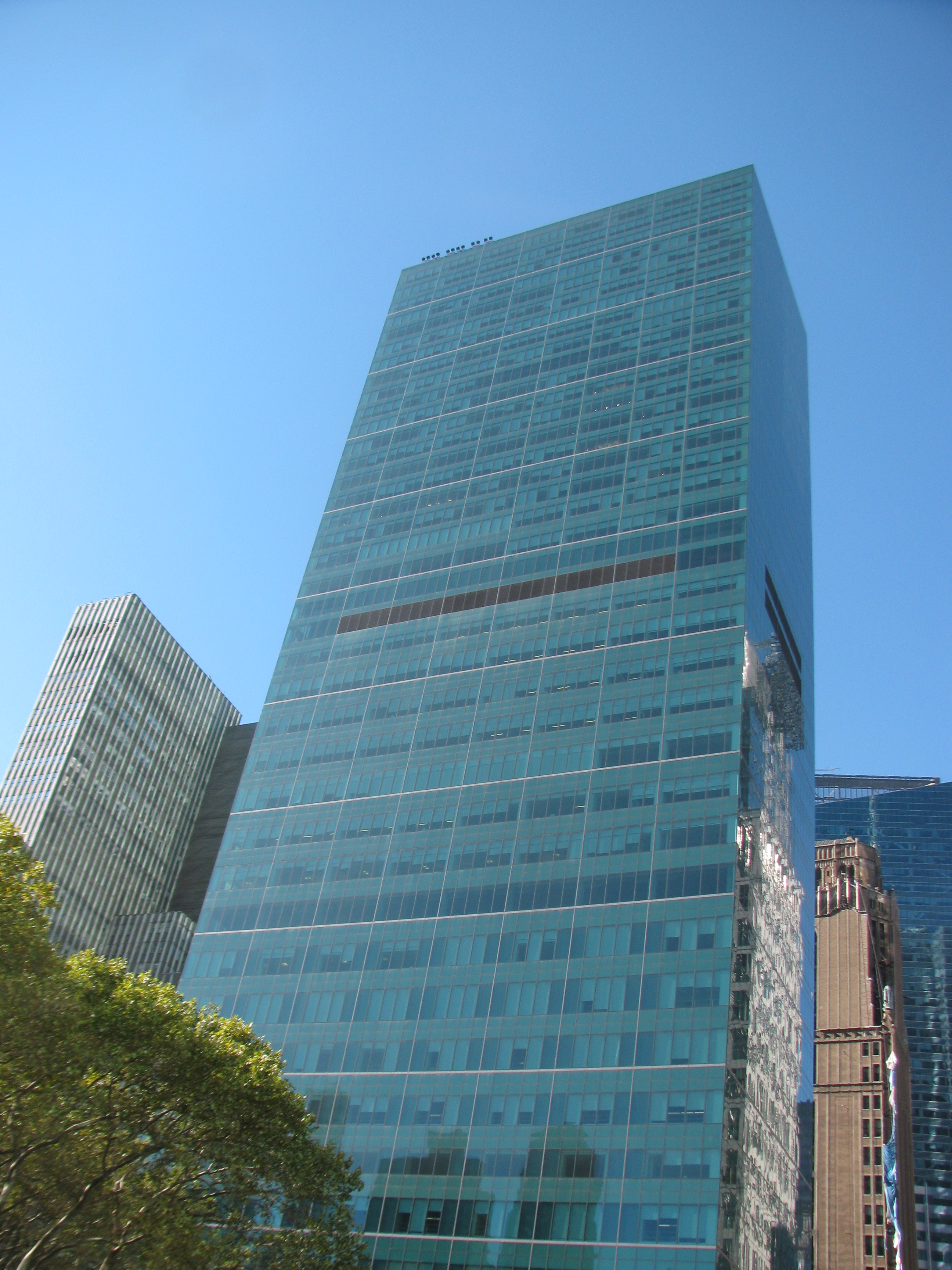 Verizon Building